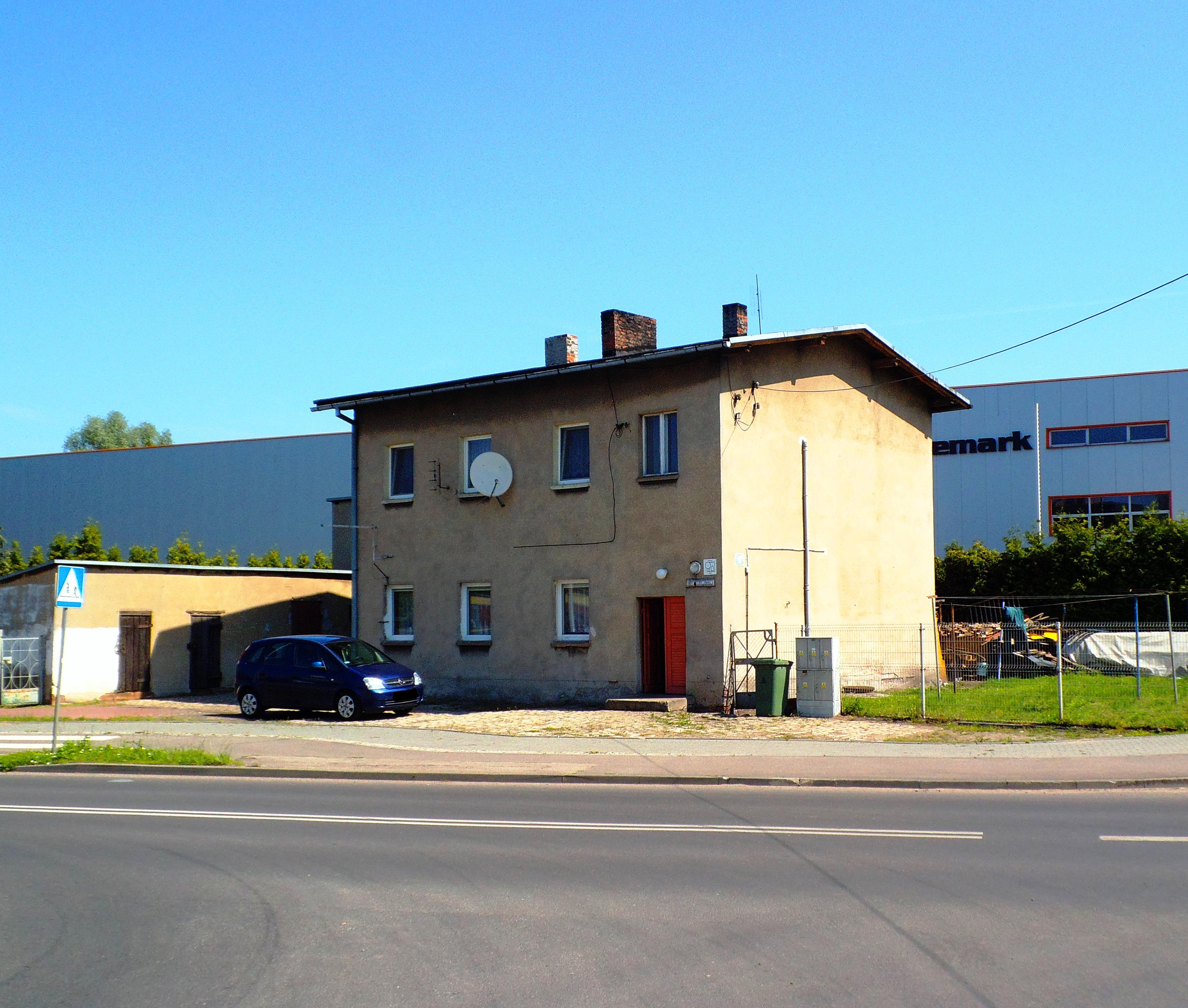 Dawny budynek dworca Toruń Mokre